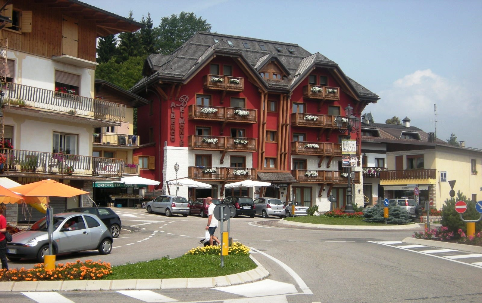 Il centro di Treschè Conca